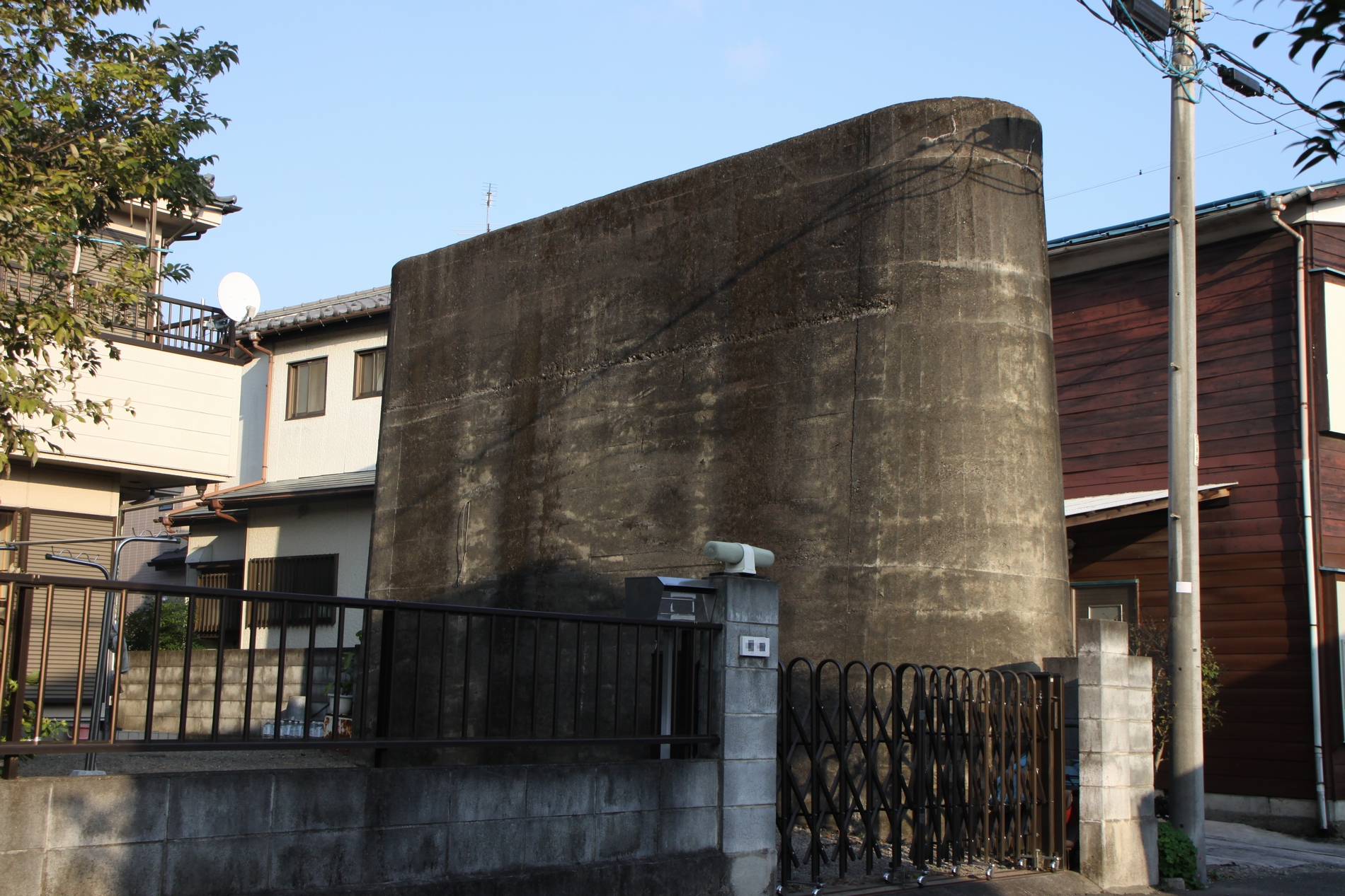 京王御陵線の橋脚